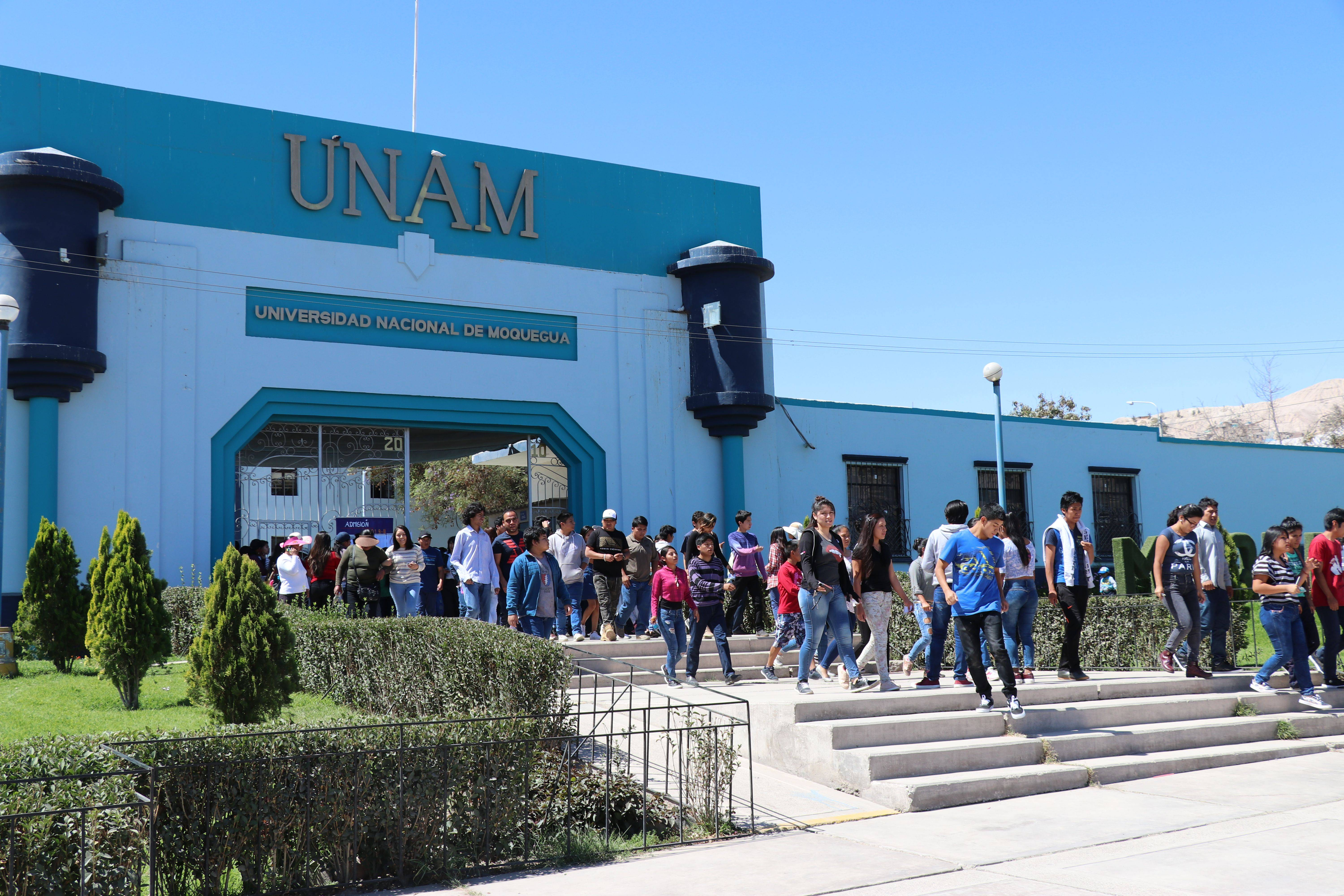 Ingreso al Campus de la Universidad Nacional de Moquegua - Sede Principal